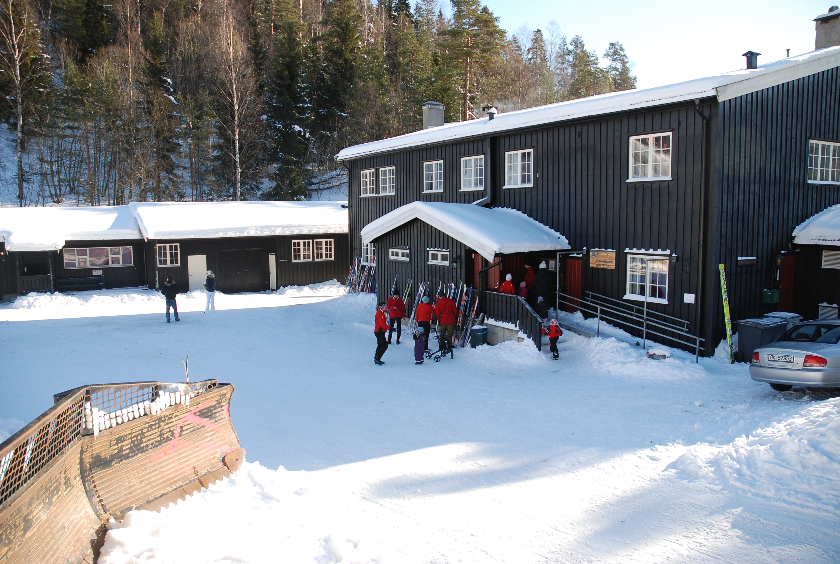 Linderudkollen sports lodge, besided the Linderudkollen skijump.